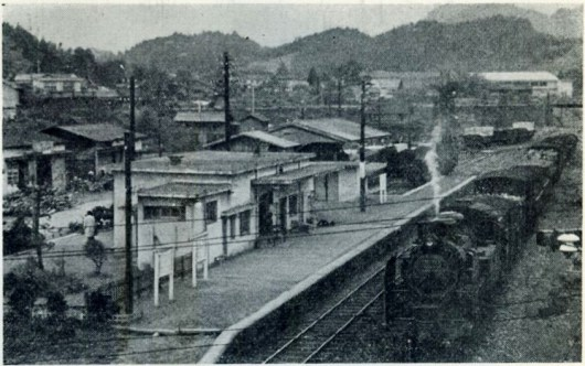 国鉄宮原線肥後小国駅